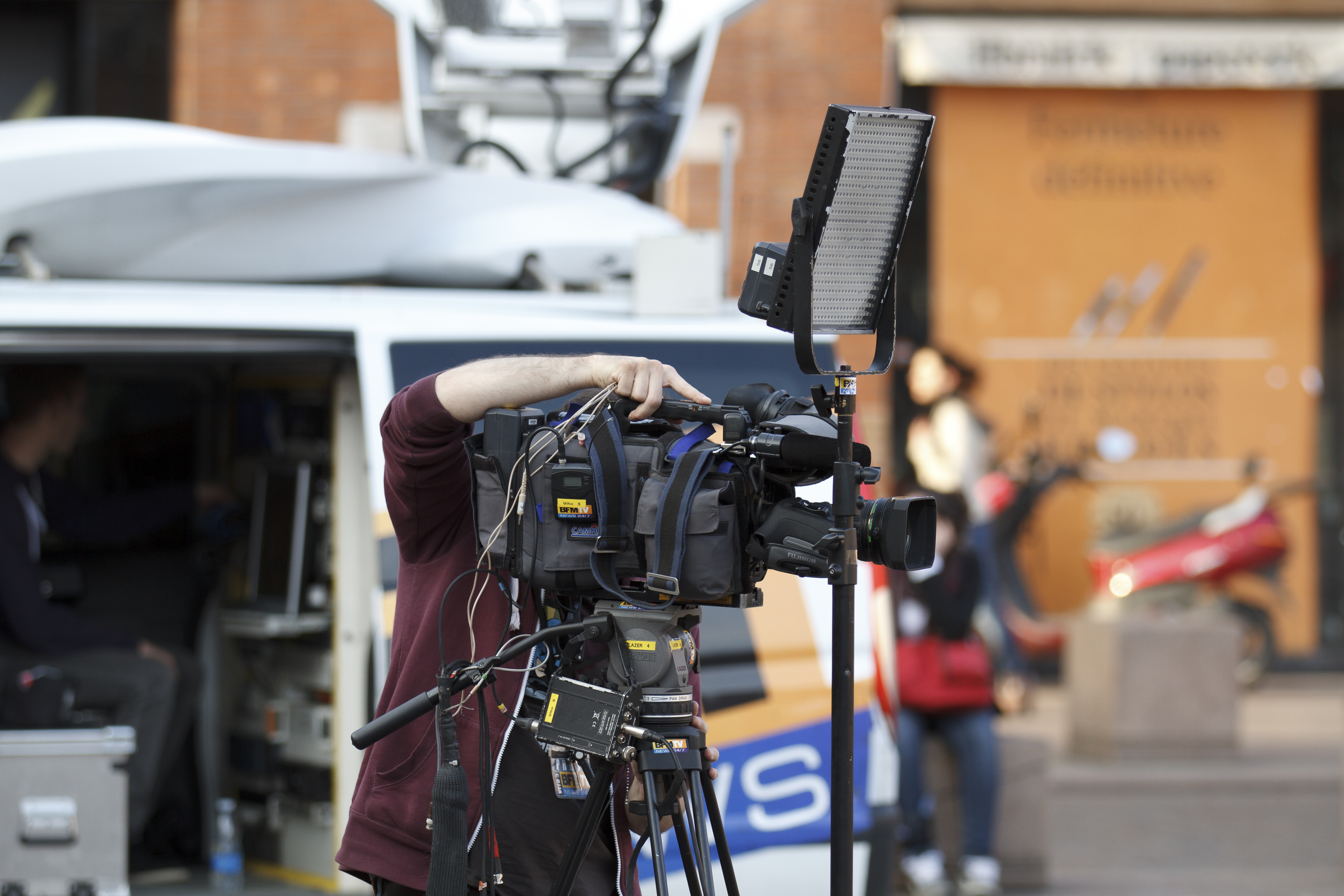 Mise en place des caméras de BFM TV place du capitole à la suite des Fusillades de 2012 en Midi-Pyrénées.